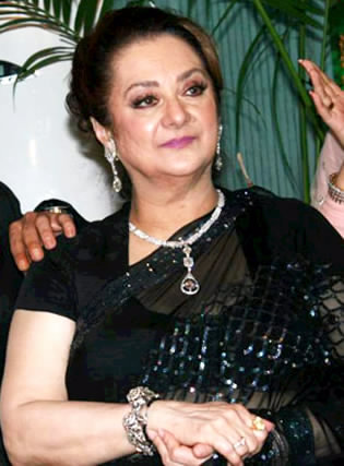 Saira Banu at Dilip Kumar's birthday celebrations